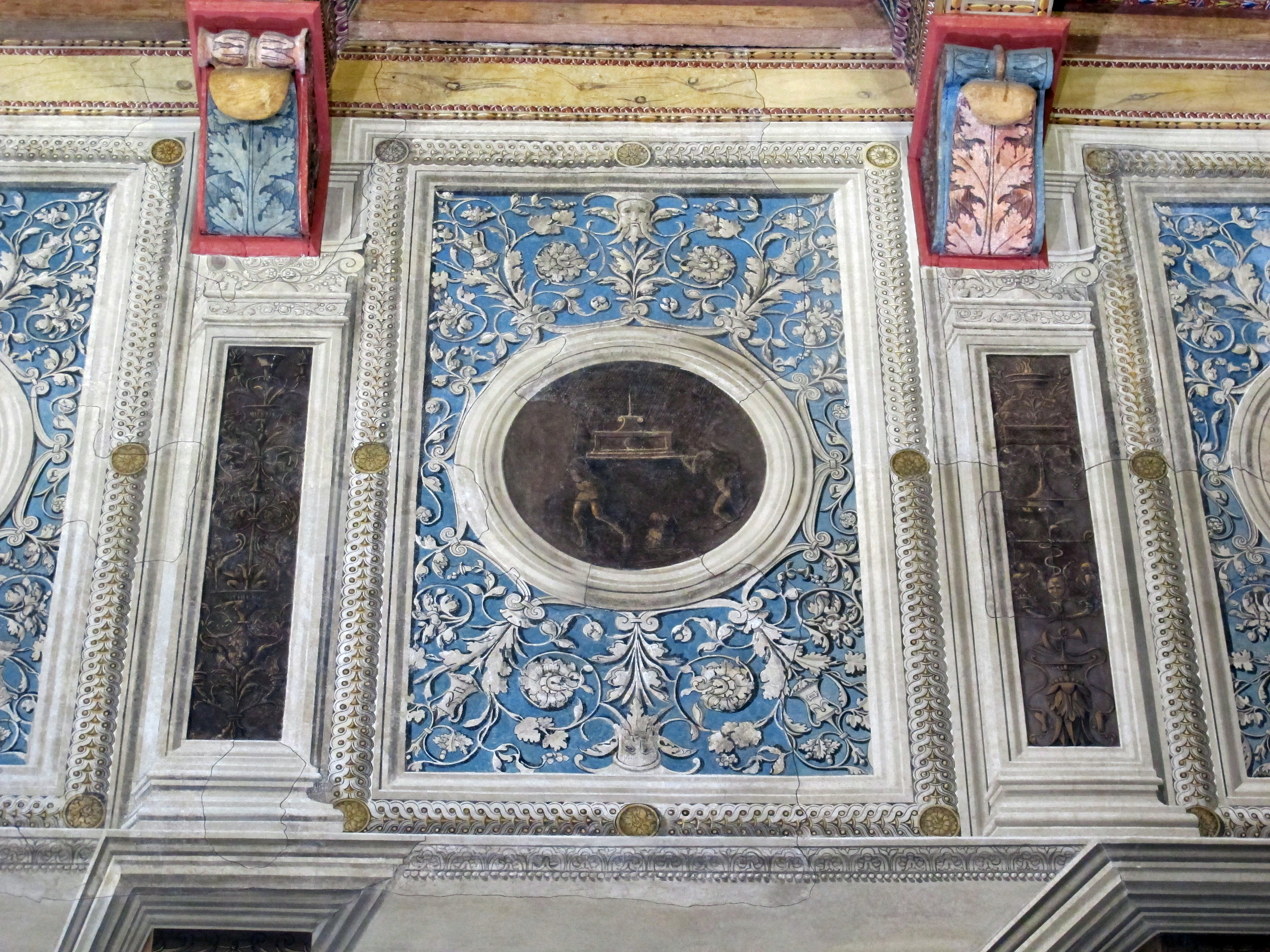 Palazzo dei Penitenzieri - Interno